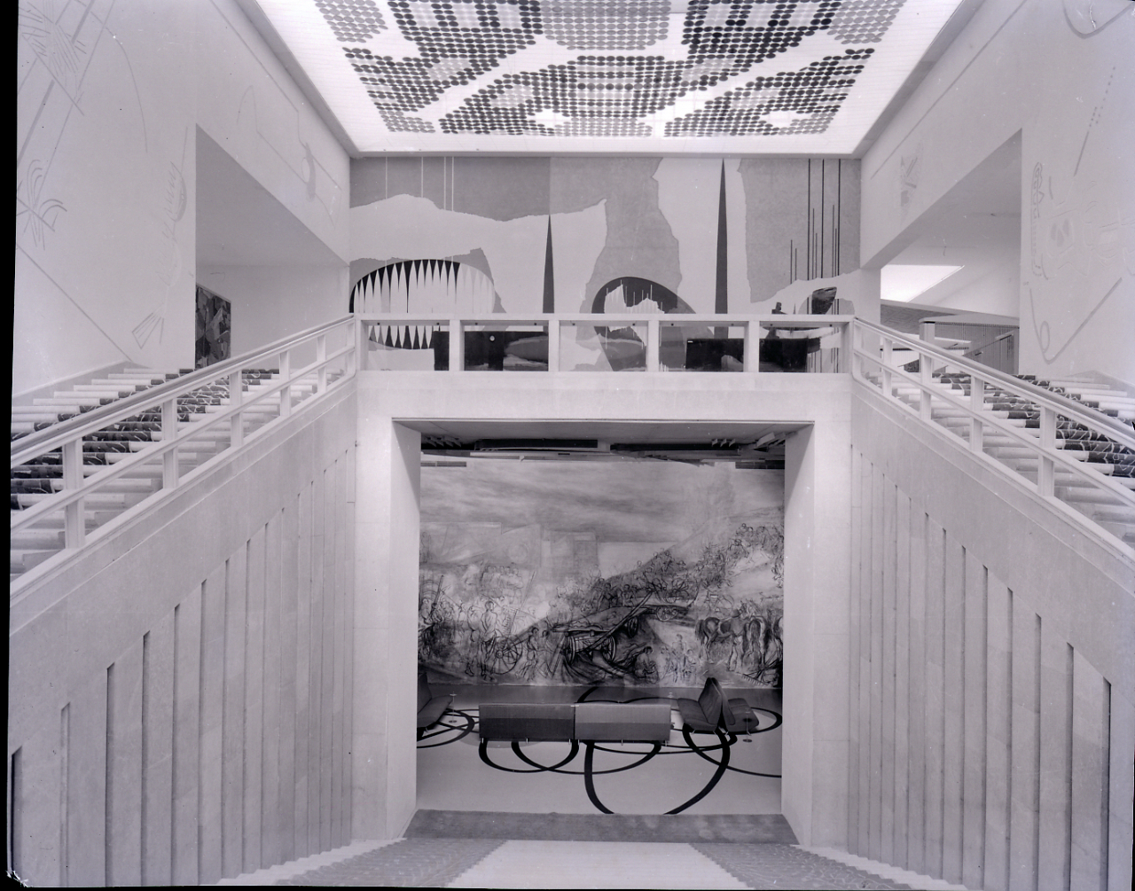 Milano. X Triennale. Allestimento del padiglione dell'Industrial Design interno a Palazzo dell'Arte su progetto dell'architetto Achille Castiglioni. Servizio fotografico : Milano, 1954 / Paolo Monti. - Buste: 2, Fototipi: 2 : Negativo b/n, gelatina bromuro d'argento/ pellicola ; 10x12. - ((Serie costituita da 2 negativi identificati con i nn.: 20814-20816. Numerazione parallela: 1190, 1287. La suddetta serie è contenuta nella scatola identificata con la numerazione 20762-20827. Sulla scatola manoscritto con pennarello nero: "X dal 1047 al 1200". La scatola è a sua volta contenuta in una scatola grande col coperchio giallo. - Occasione: Documentazione della X Triennale del 1954, intitolata "Prefabbricazione - Industrial Design: Esposizione Internazionale delle Arti Decorative e Industriali Moderne e dell'Architettura Moderna". L'esposizione si tenne presso il Palazzo dell'Arte